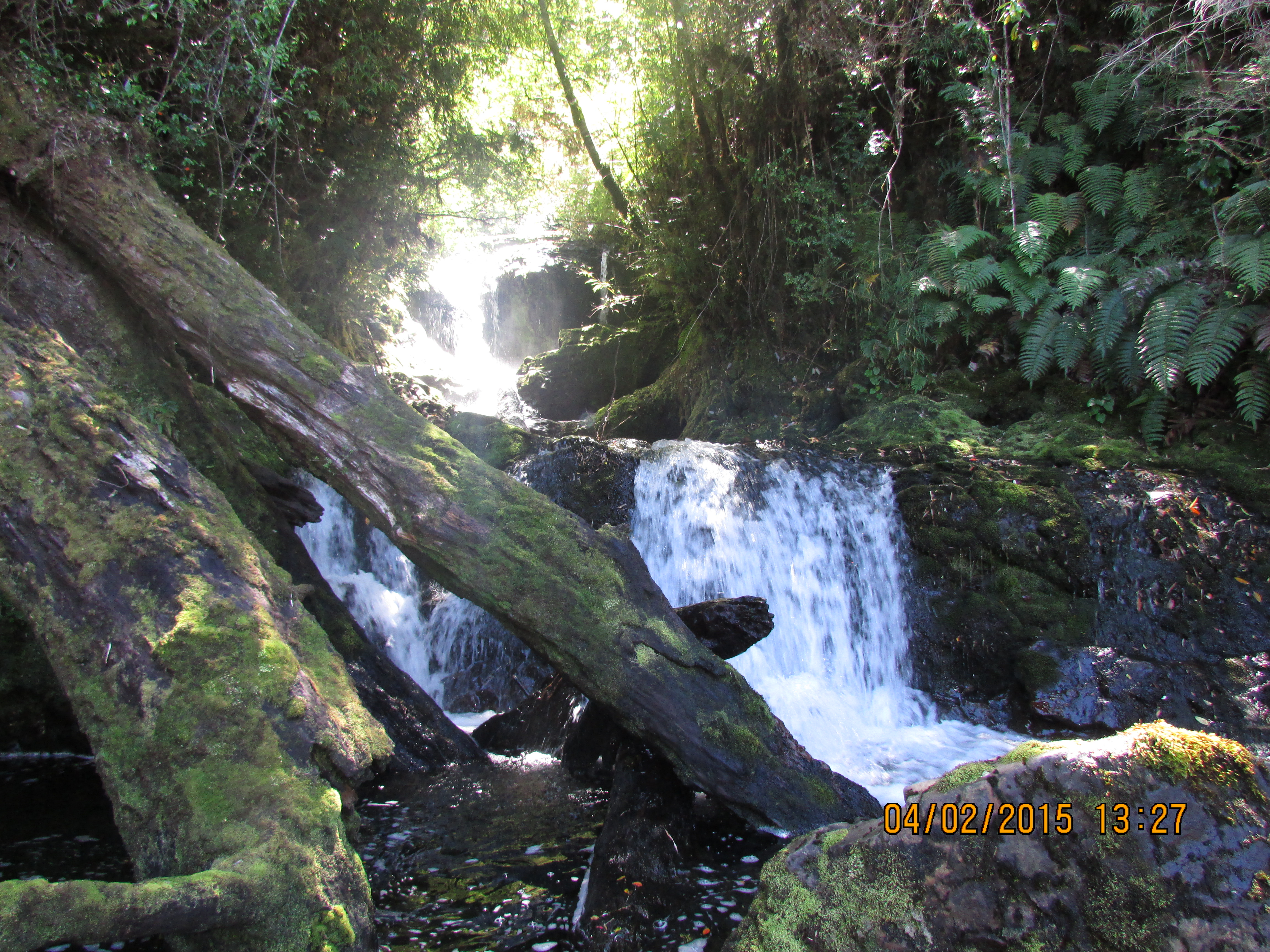 Aysén, XI Región, Chile